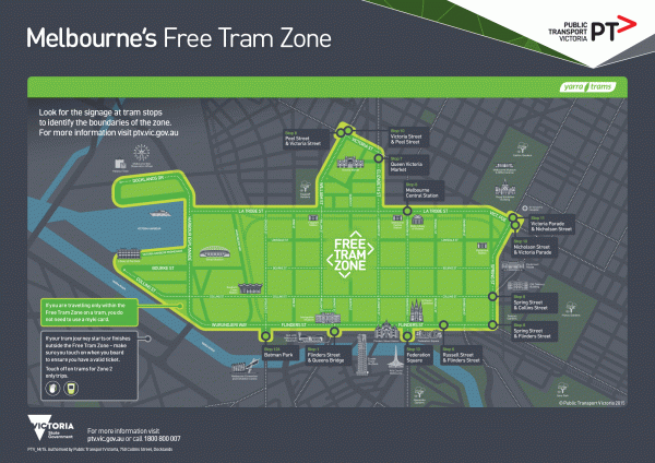 녹색바탕으로 칠해진 부분이 무료로 노면전차(트램)을 이용할 수 있는 구역이다. 또한 무료구간이 끝나는 정류소들도 함께 표시되어 있다.